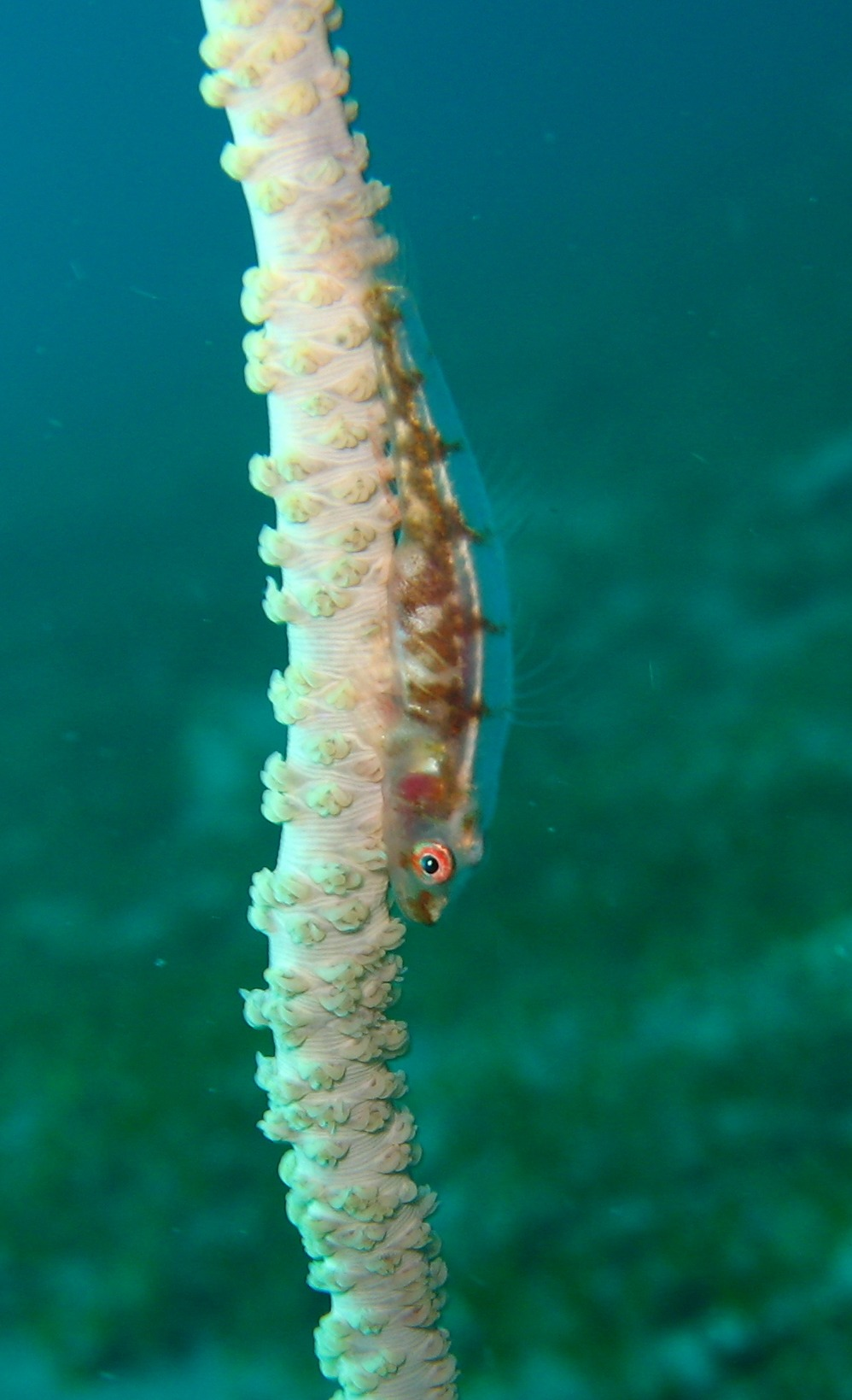 Mactan Cebu, Philippines